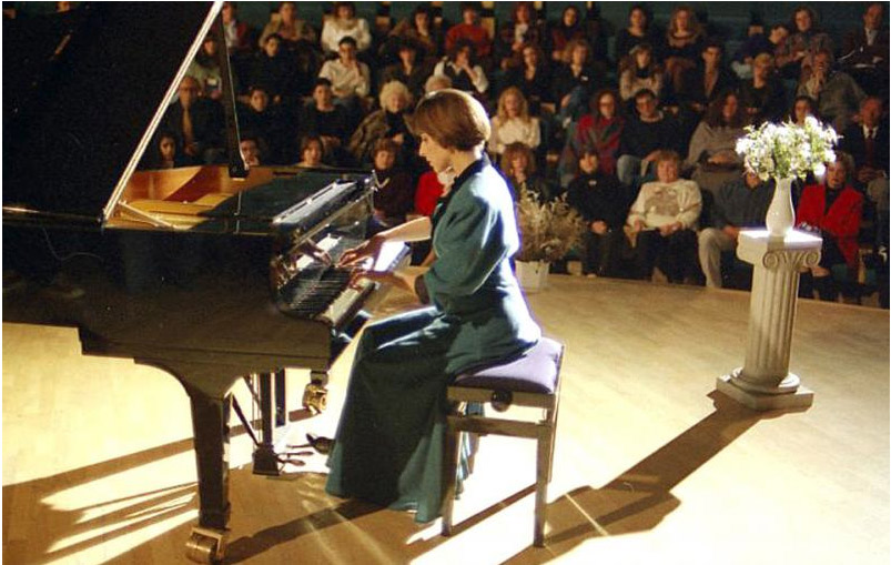 חגית דסברג מנגנת בסרט גולם במעגל